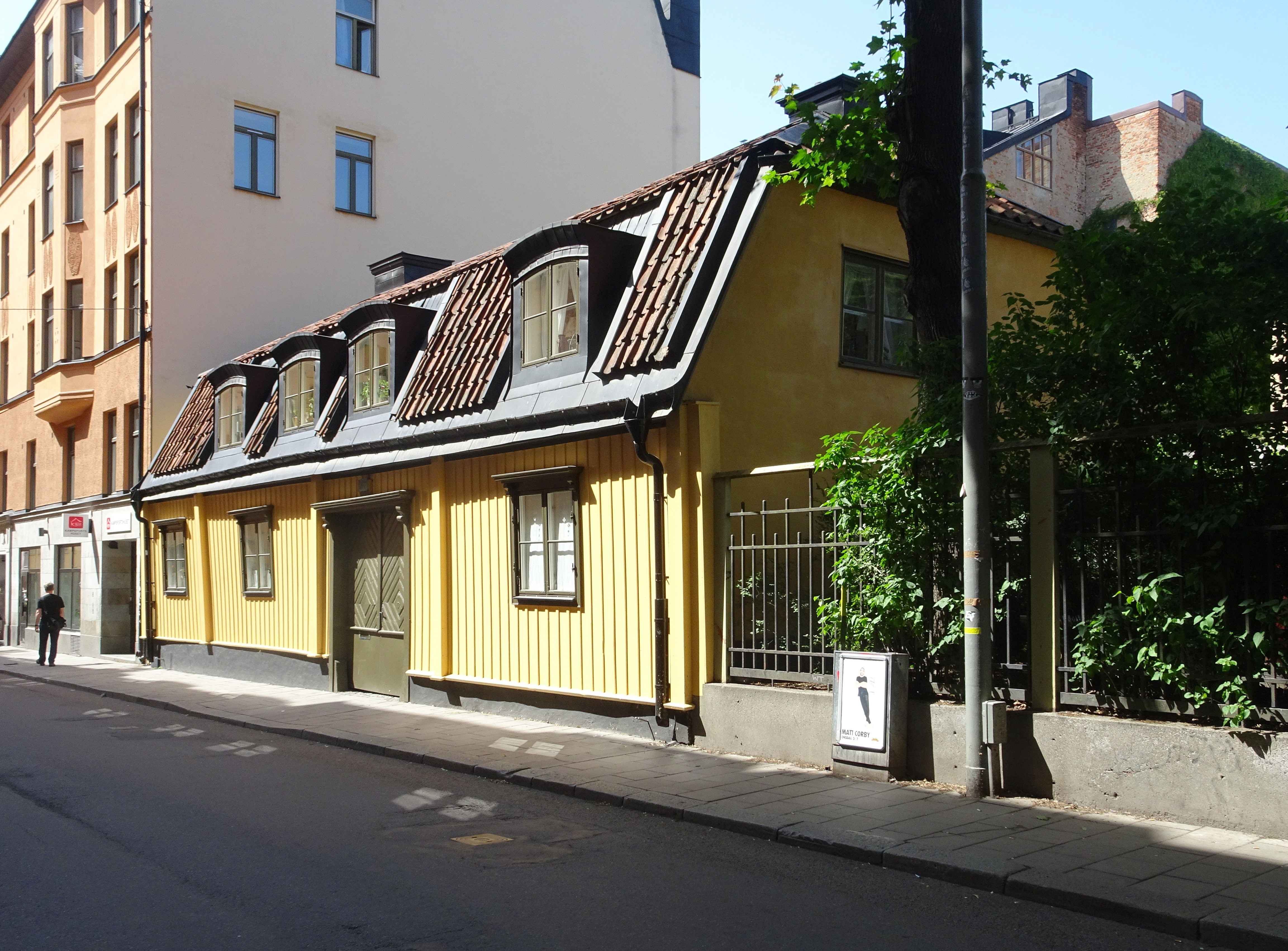 Tjärhovsgatan nr 7